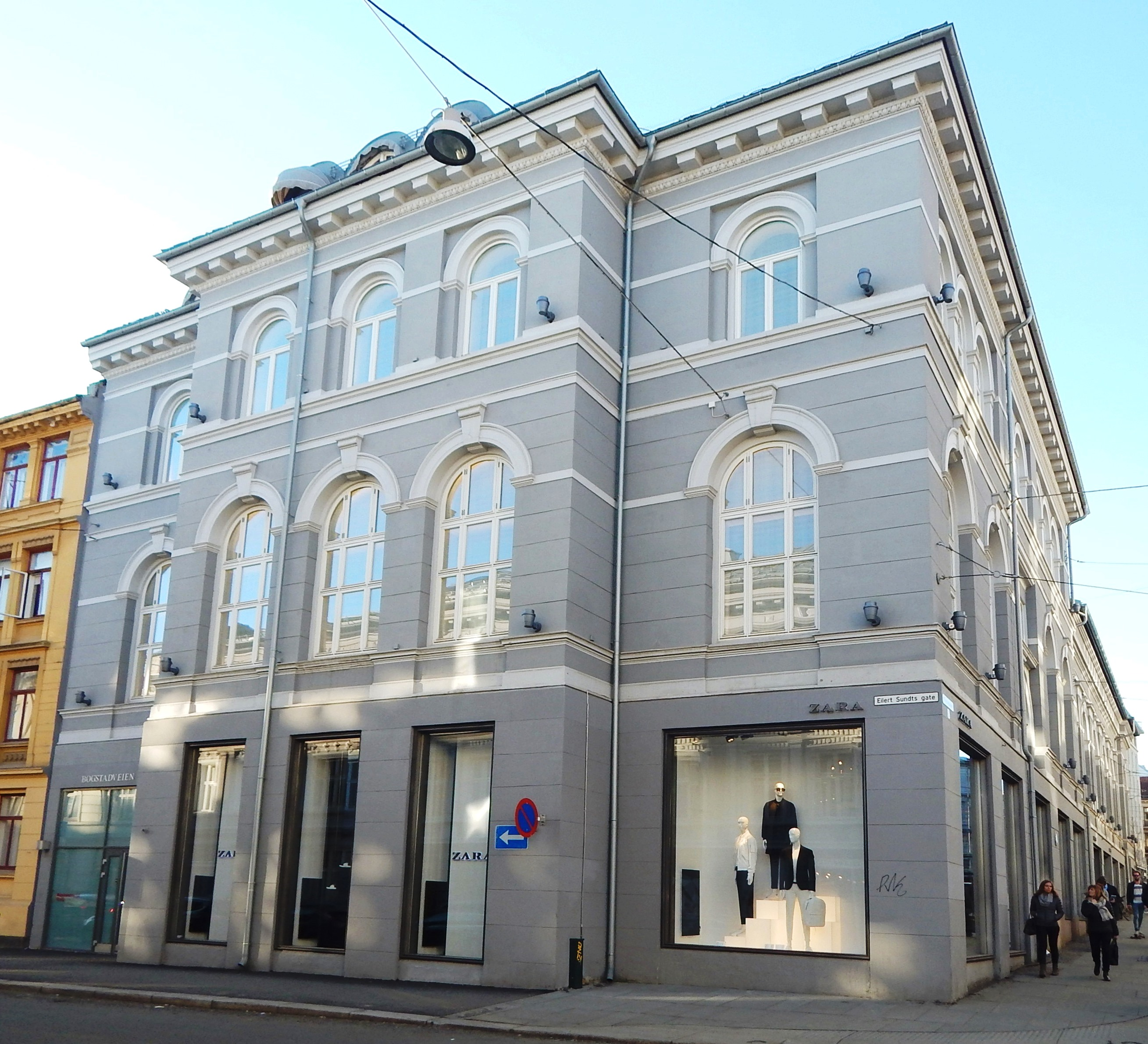 Bogstadveien 12. Arkitekt: Ove Ekman (1887).